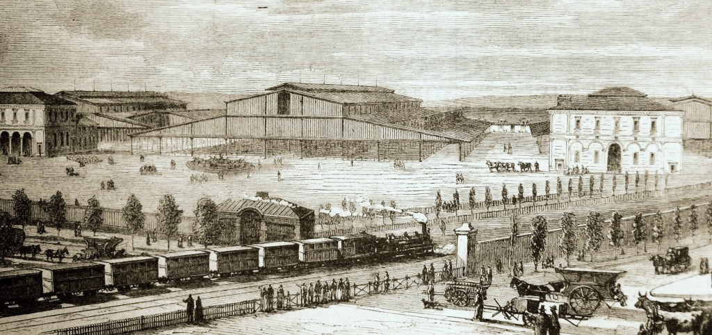 Les abattoirs de la Villette à leur création en 1867